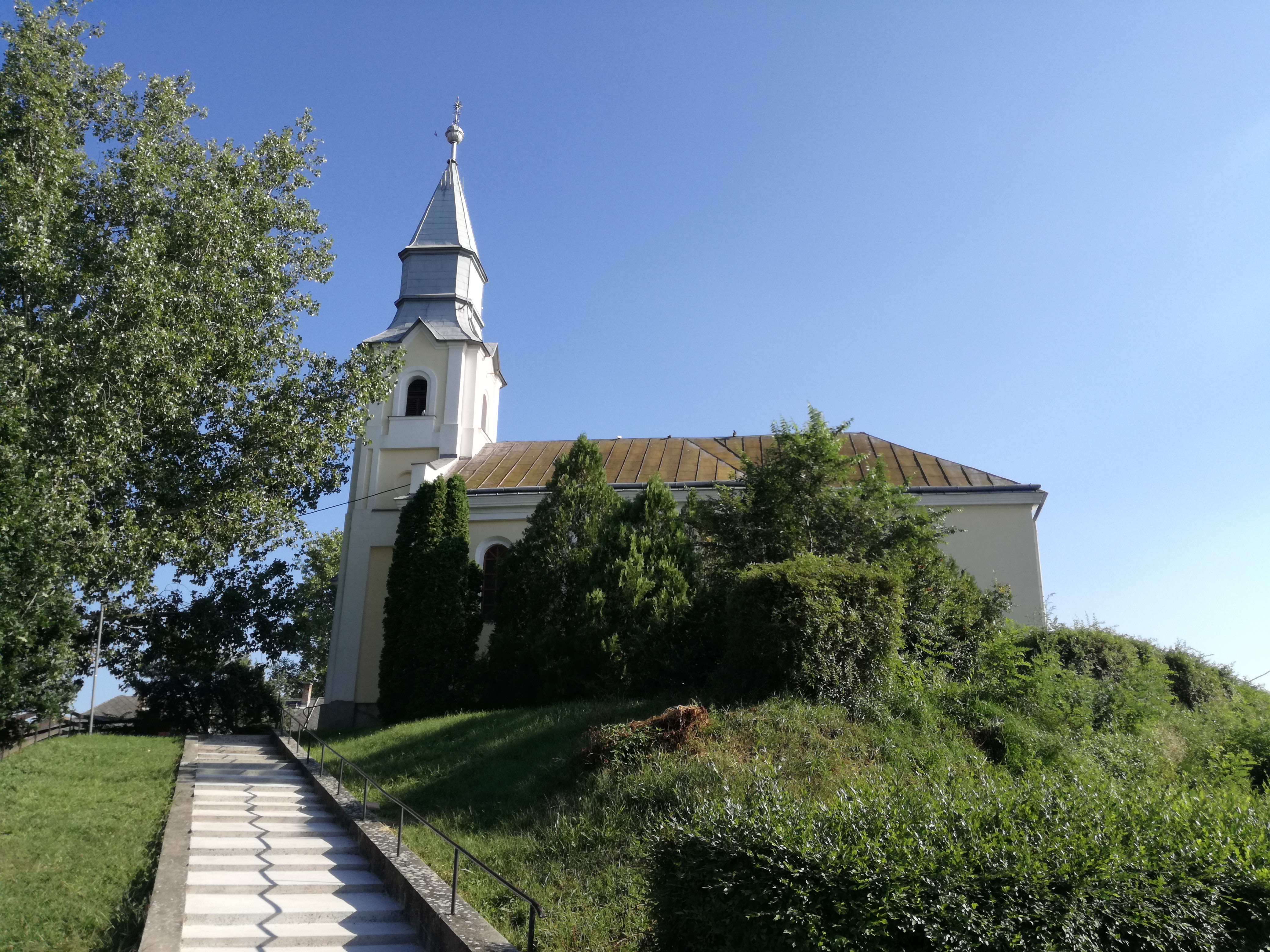 A rétközberencsi templom